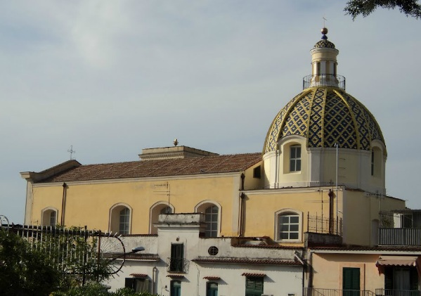 Santuario di san Sebastiano al Vesuvio.